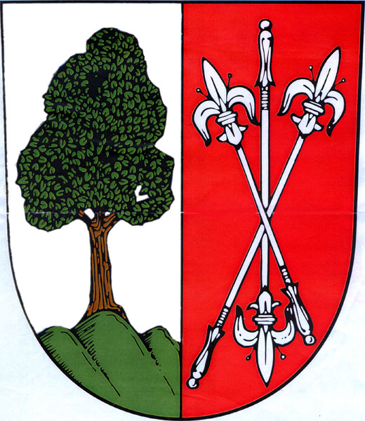 Znak obce Litenčice